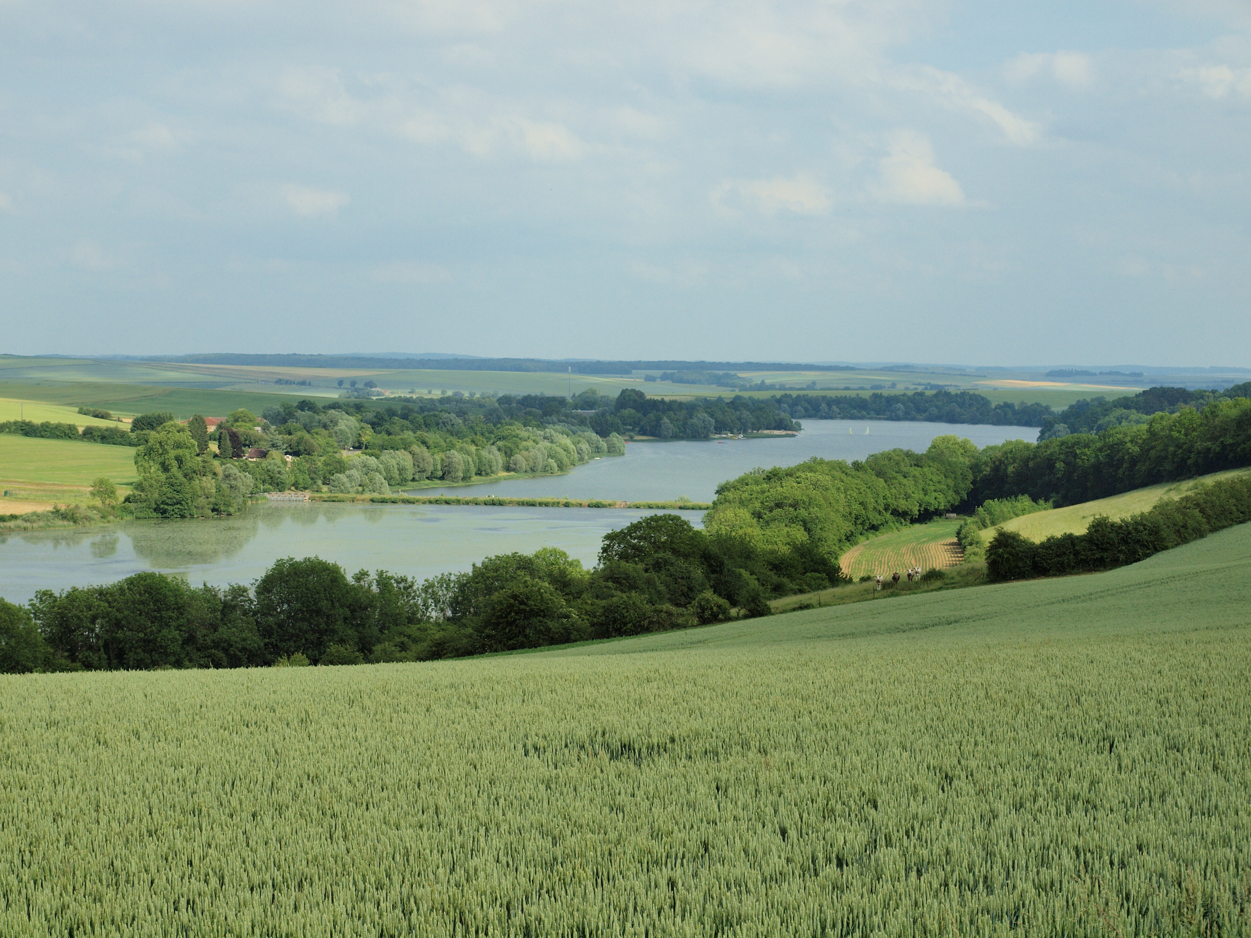 Lac de Bairon (Ardennes, France) , vue depuis la D991